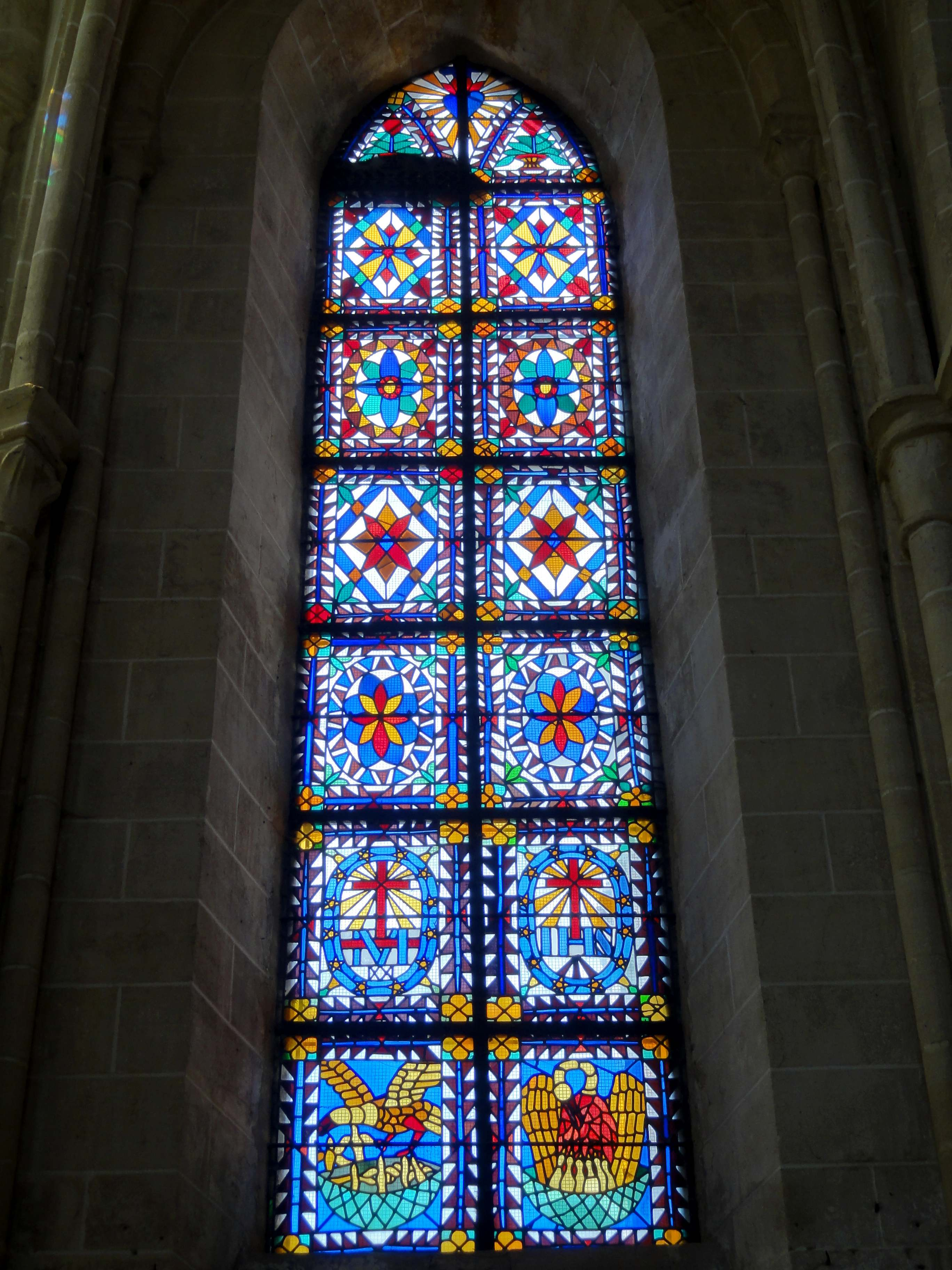 Verrière n° 4 (pan sud de l'abside), principalement ornementale, réalisée en 1849 par l'abbé Théodore-Cyrille Deligny (Francières 1808 - Compiègne 1887), curé de Jonquières de 1834 à 1861. Représentation, sur les deux régistres inférieures : monogramme M de la Vierge Marie, monogramme IHS, l'aigle vole au-dessus de ses six petits, le pélican nourrit de sa propre chair ses petits.